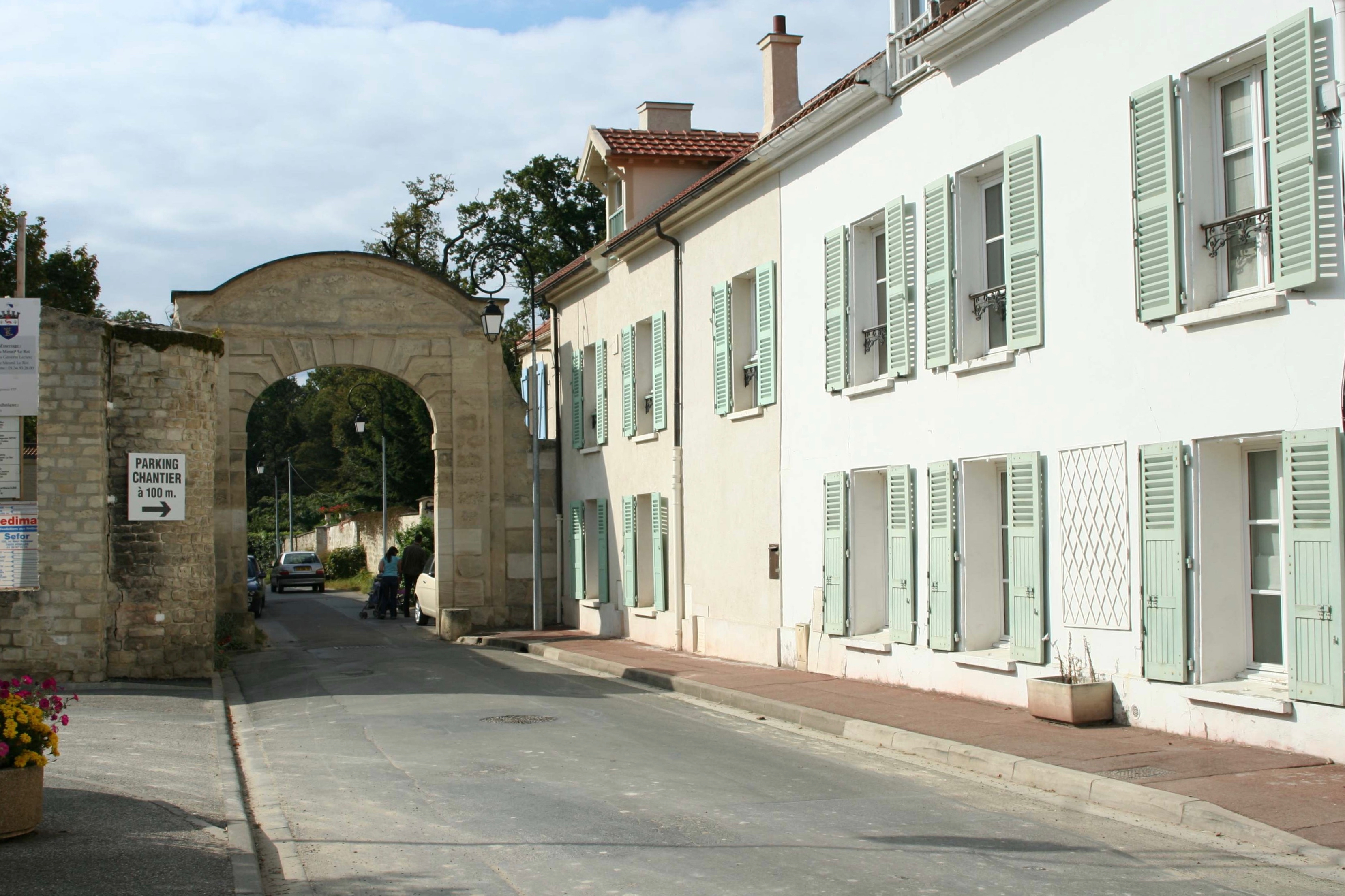 La porte de la forêt au Mesnil-le-Roi - Yvelines (France)